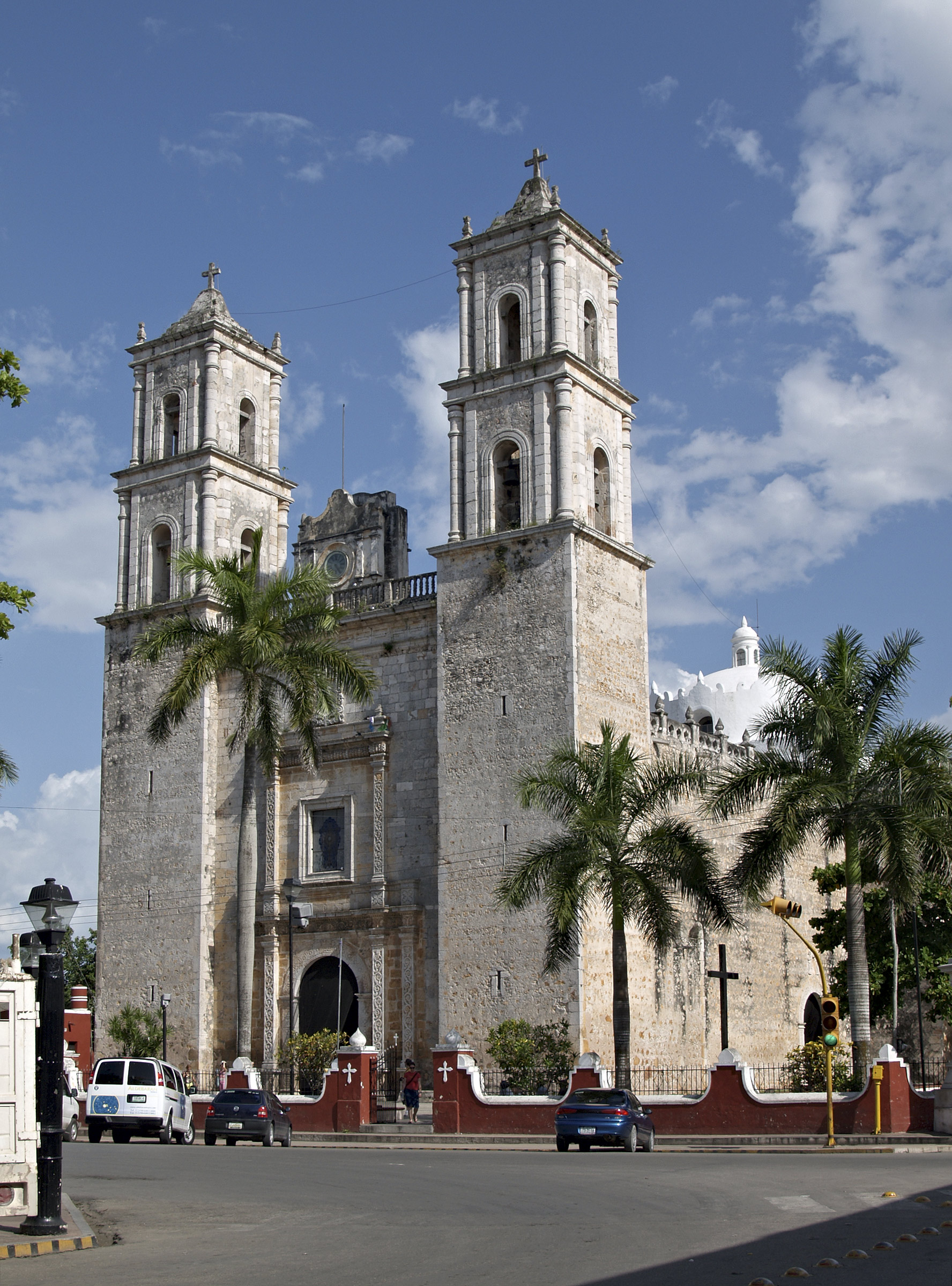 Iglesia parroquial de San Gervasio, Valladolid (Yucatán, México)